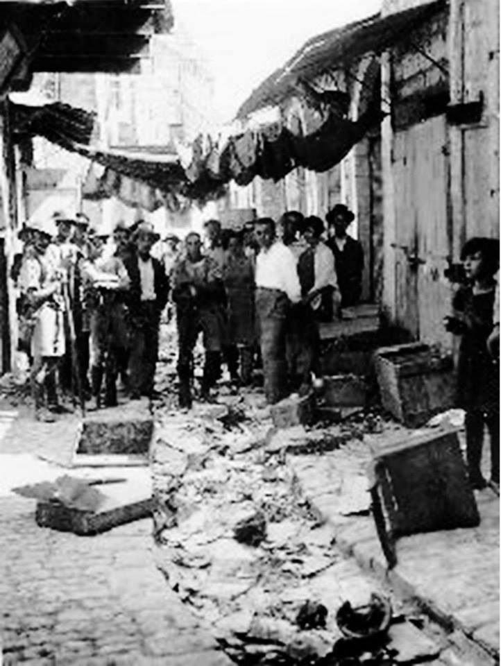 חיילים בריטים ותושבי צפת אחרי מאורעות תרפ"ט סוקרים את ההריסות